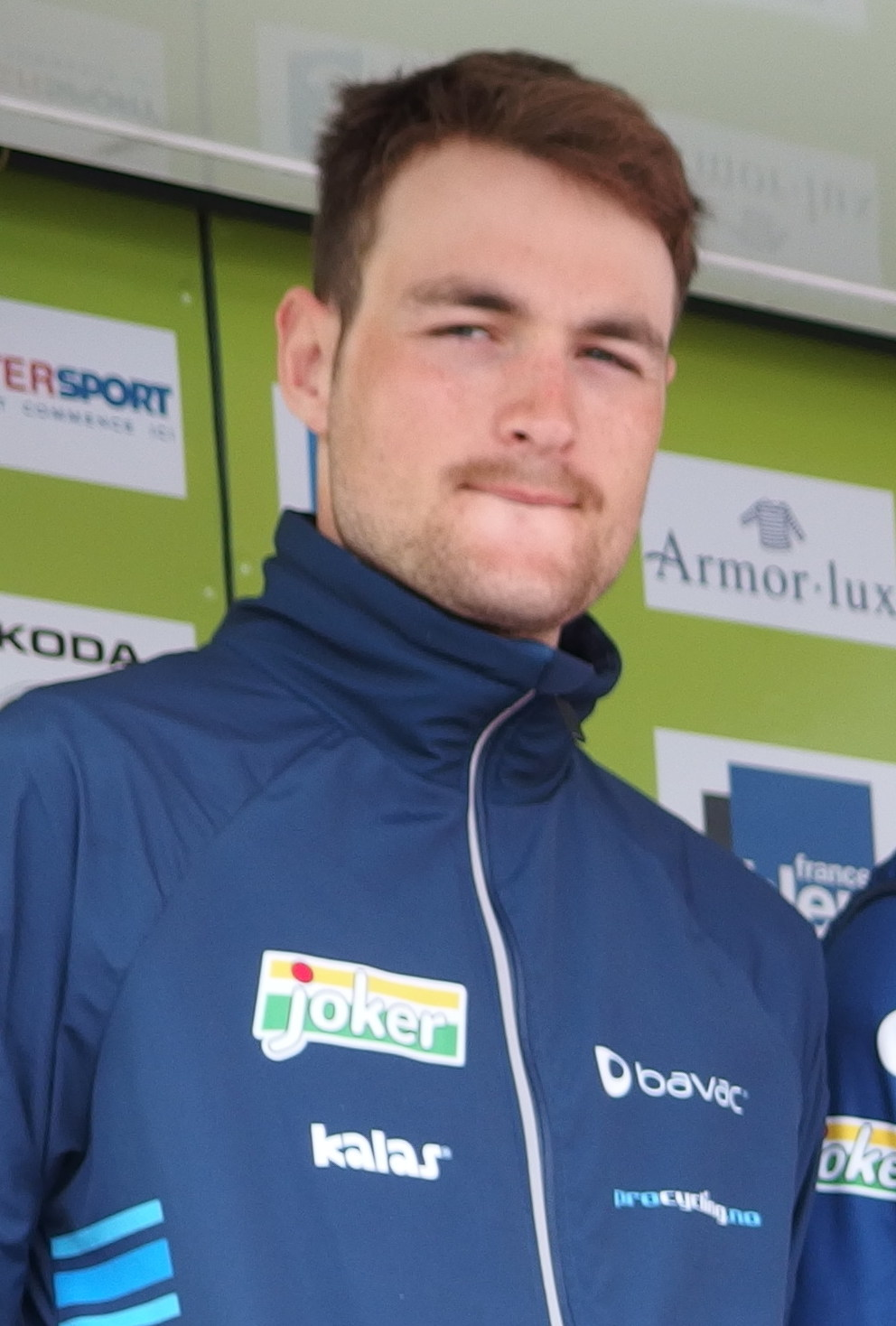 Tour de Bretagne 2014 - Présentation des équipes au départ de la sixième étape à Radenac - Équipe Joker Depicted person: Jo Kogstad Ringheim